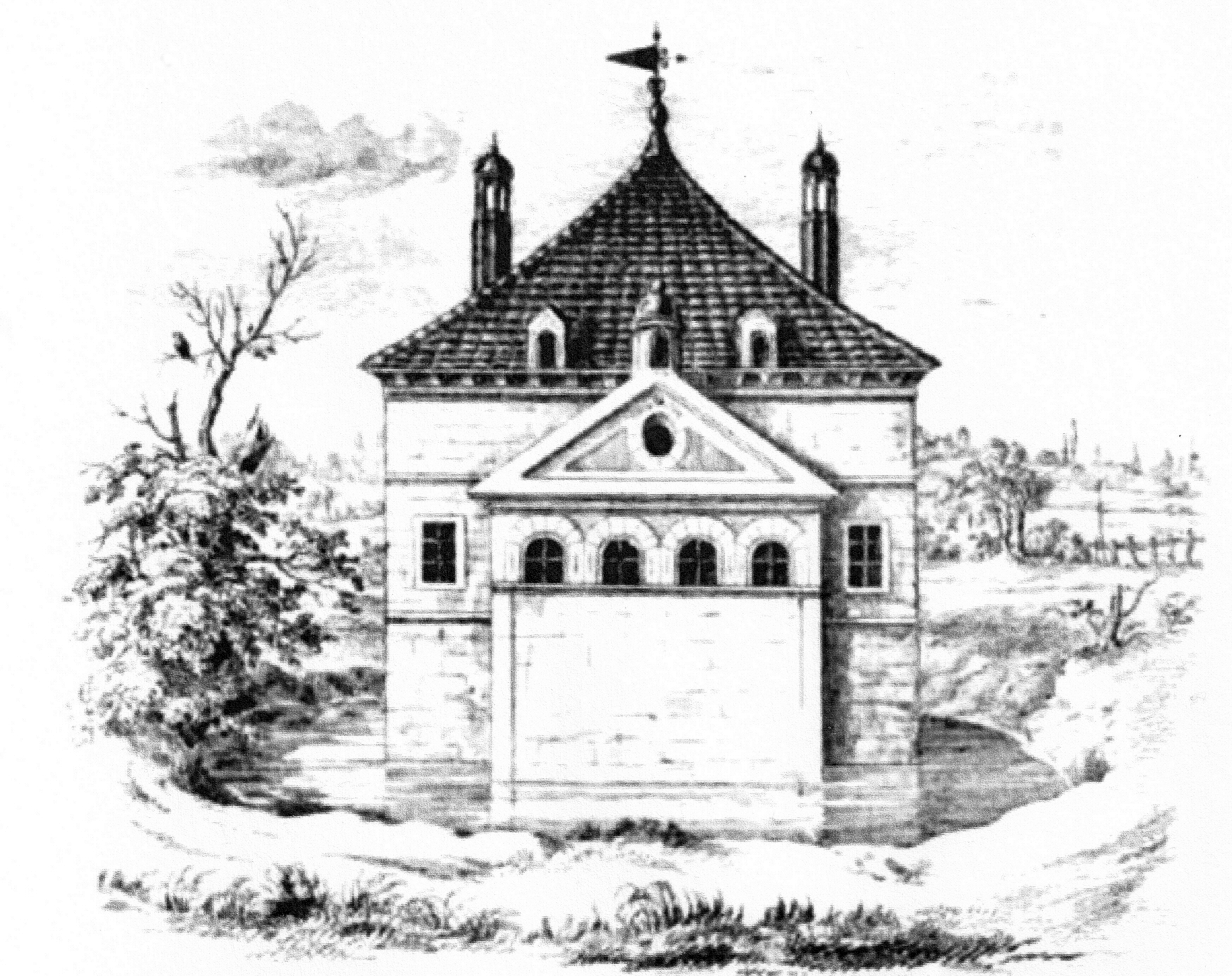 Das ehemalige Gutshaus Satjewitz, Zeichnung von Köhler und Roisternitz 1862